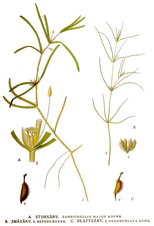 A. Zannichellia palustris L. var. major B. Zannichellia palustris L. var. repens C. Zannichellia palustris L. var. pedicellata Original Description A. Storsärv, Zannichellia major Boenn. B. Småsärv, Zannichellia repens Boenn. C. Skaftsärv, Zannichellia pedunculata Rchb.